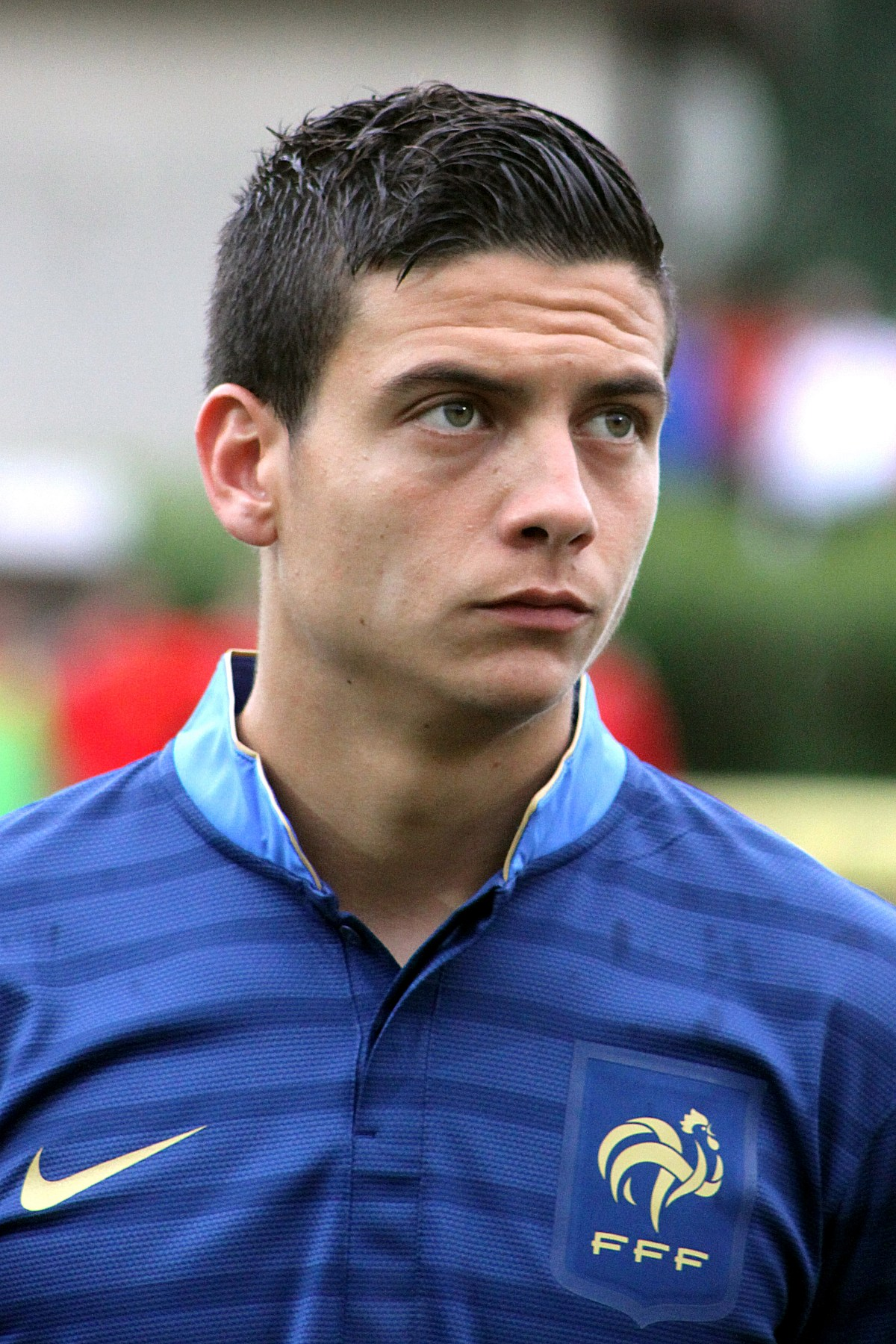 Qualifikationsspiel zur U-19 Fußball-Europameisterschaft: Österreich] gegen Frankreich am 10. Juni 2013 (0:1)] in Traiskirchen. - Das Foto zeigt Larry Azouni (Olympique Marseille). en Qualification for the 2013 UEFA European Under-19 Football Championship qualification Austria vs. France (0:1) on 2013-2013-06-10 in Traiskirchen. – The photo shows Larry Azouni (Olympique Marseille).